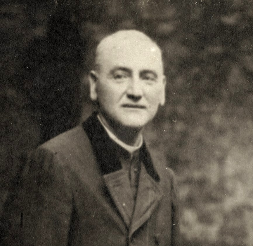 Txomin Agirre idazleari egindako erretratua